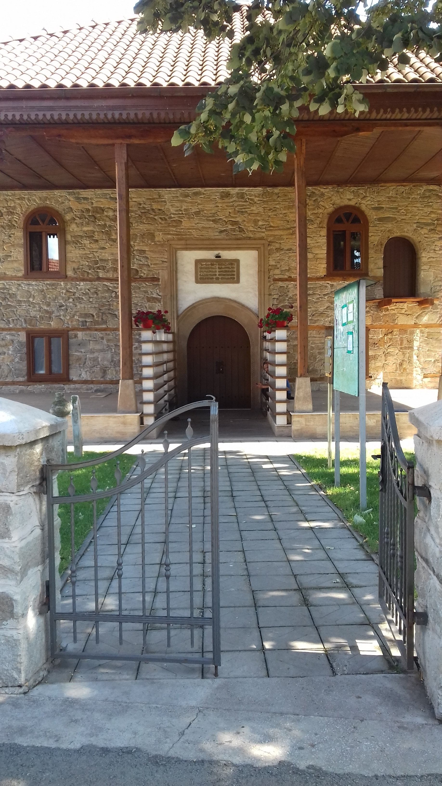 Чаршијска џамија